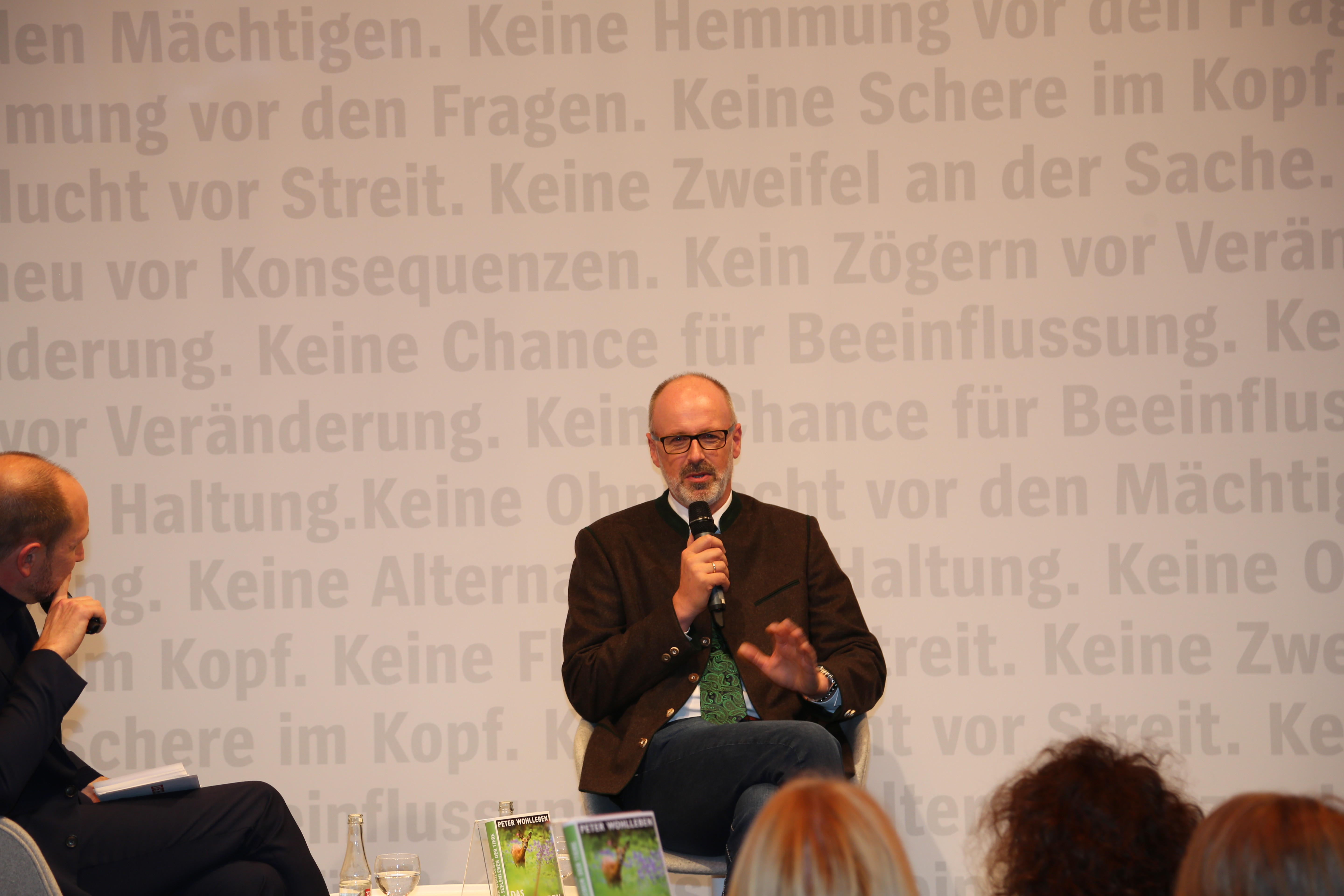 Peter Wohlleben bei der Frankfurter Buchmesse 2016